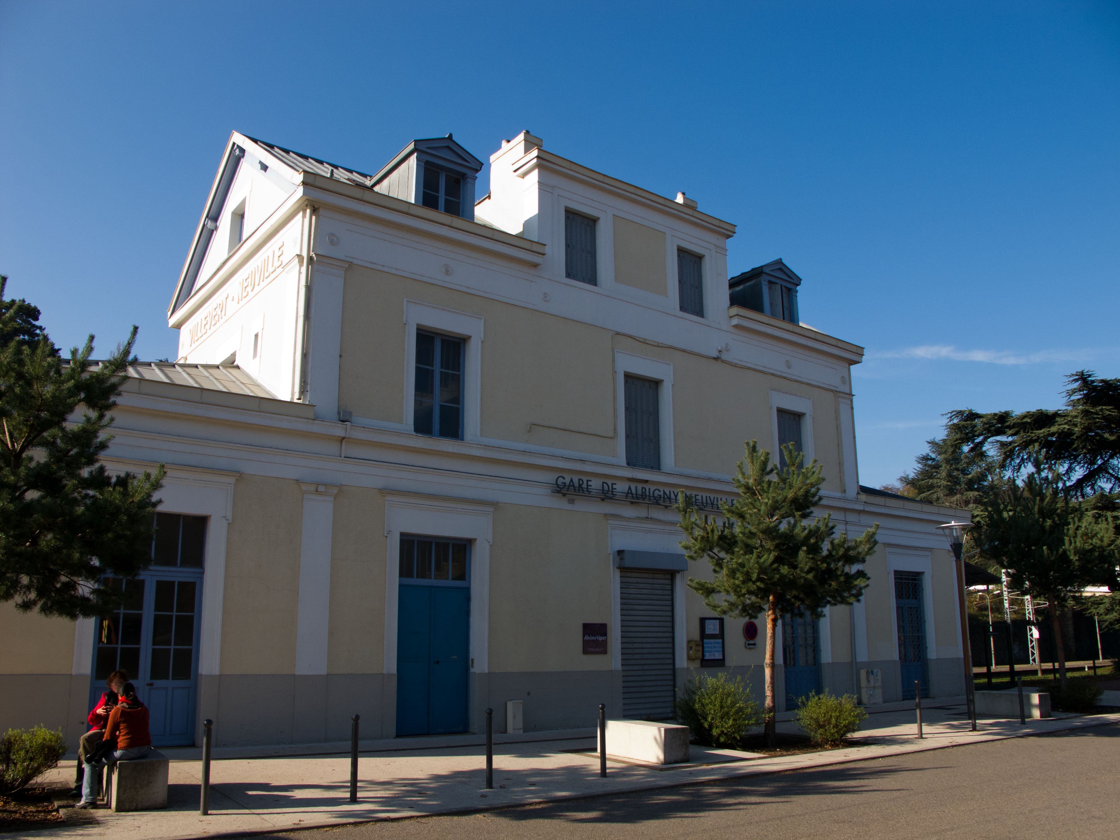 Gare d'Albigny-Neuville, Albigny-sur-Saone, France